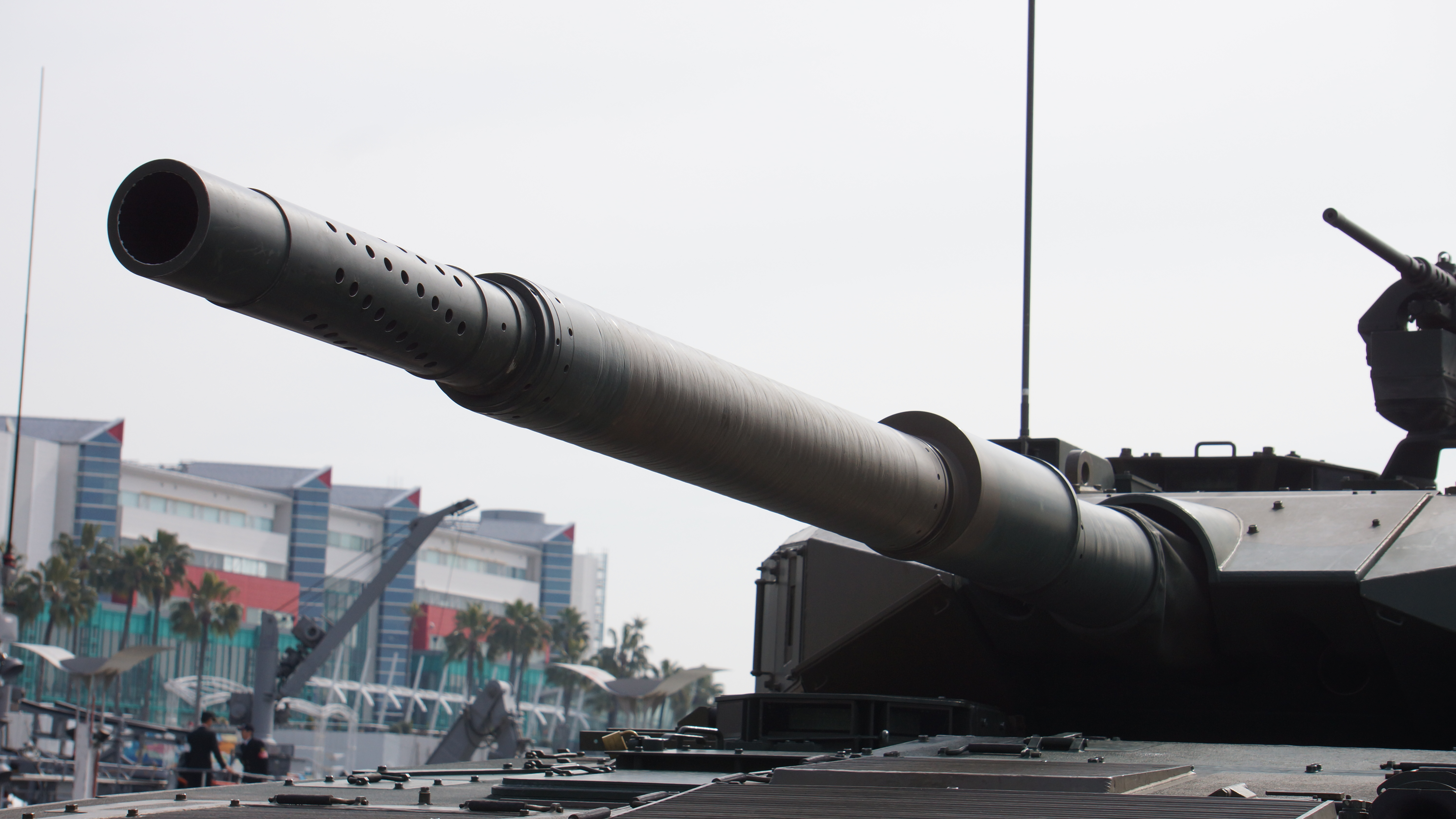 陸上自衛隊 16式機動戦闘車（試作車、99-0300号車） 105mmライフル砲。2017年3月5日 大阪南港ATCにて開催されたOSAKA防衛防災フェスティバル2017にて。